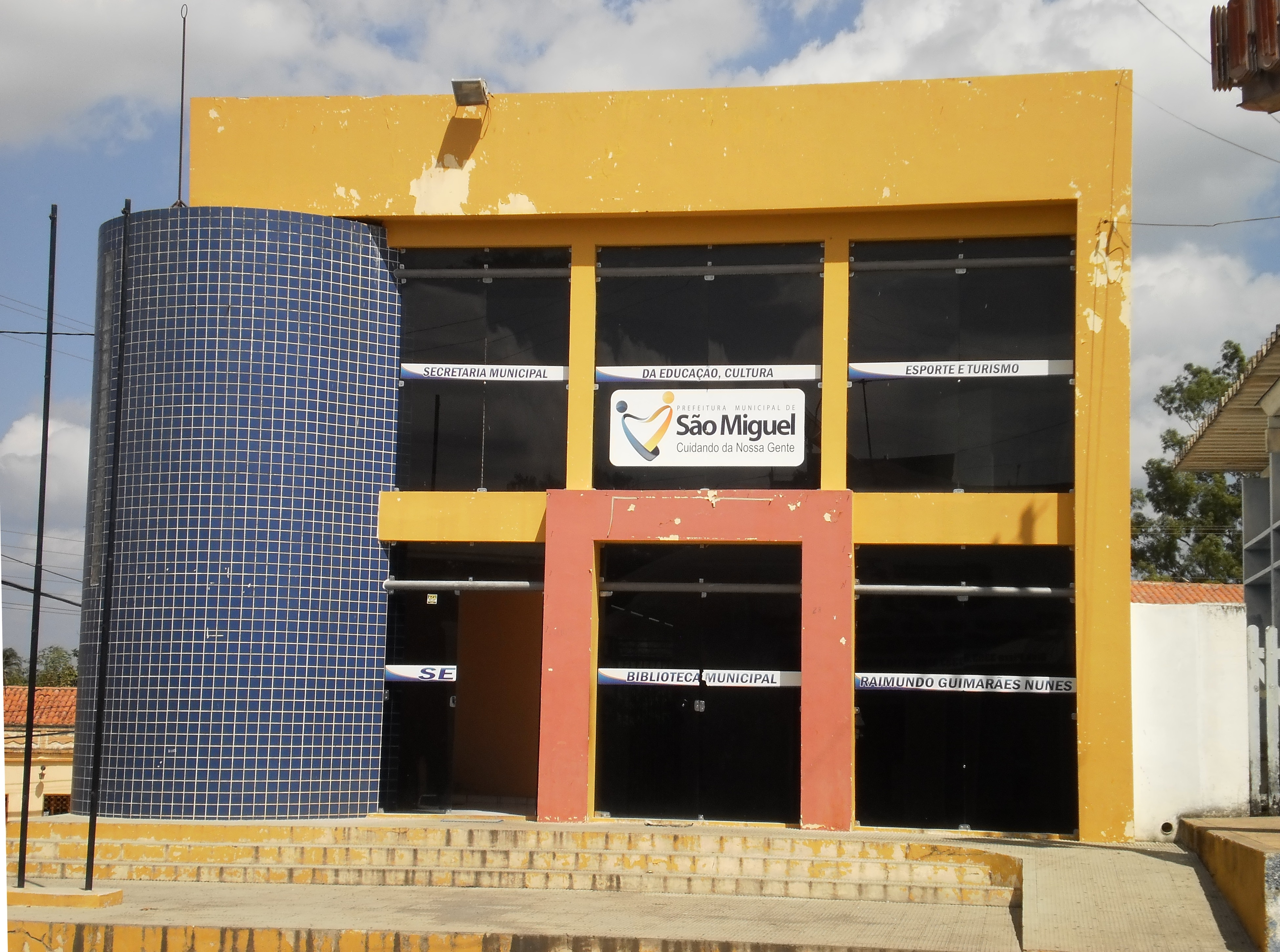 Biblioteca Municipal Raimundo Guimarães Nunes, no térreo, com a Secretaria Municipal de Educação, Cultura e Turismo (SEDUC), no primeiro andar - São Miguel, Rio Grande do Norte, Brasil.